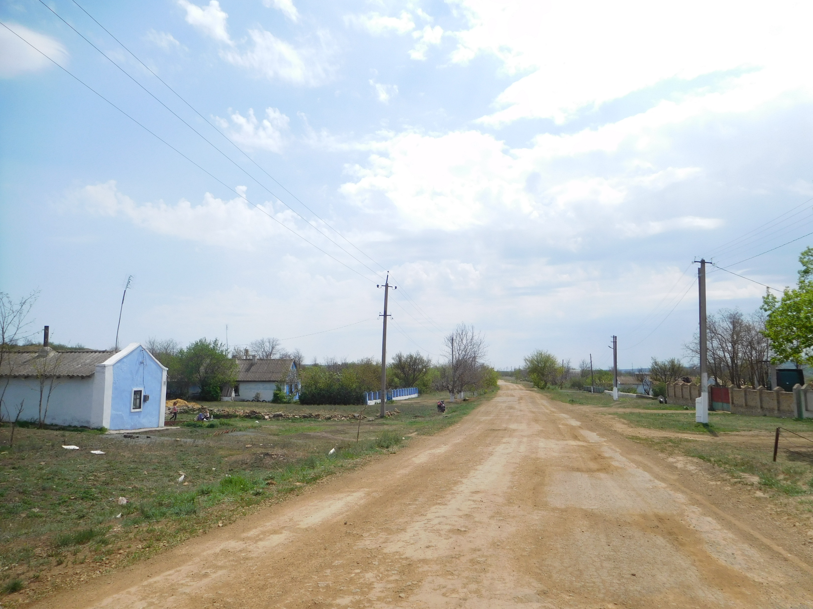 с. Верхній Куяльник, Одеська область